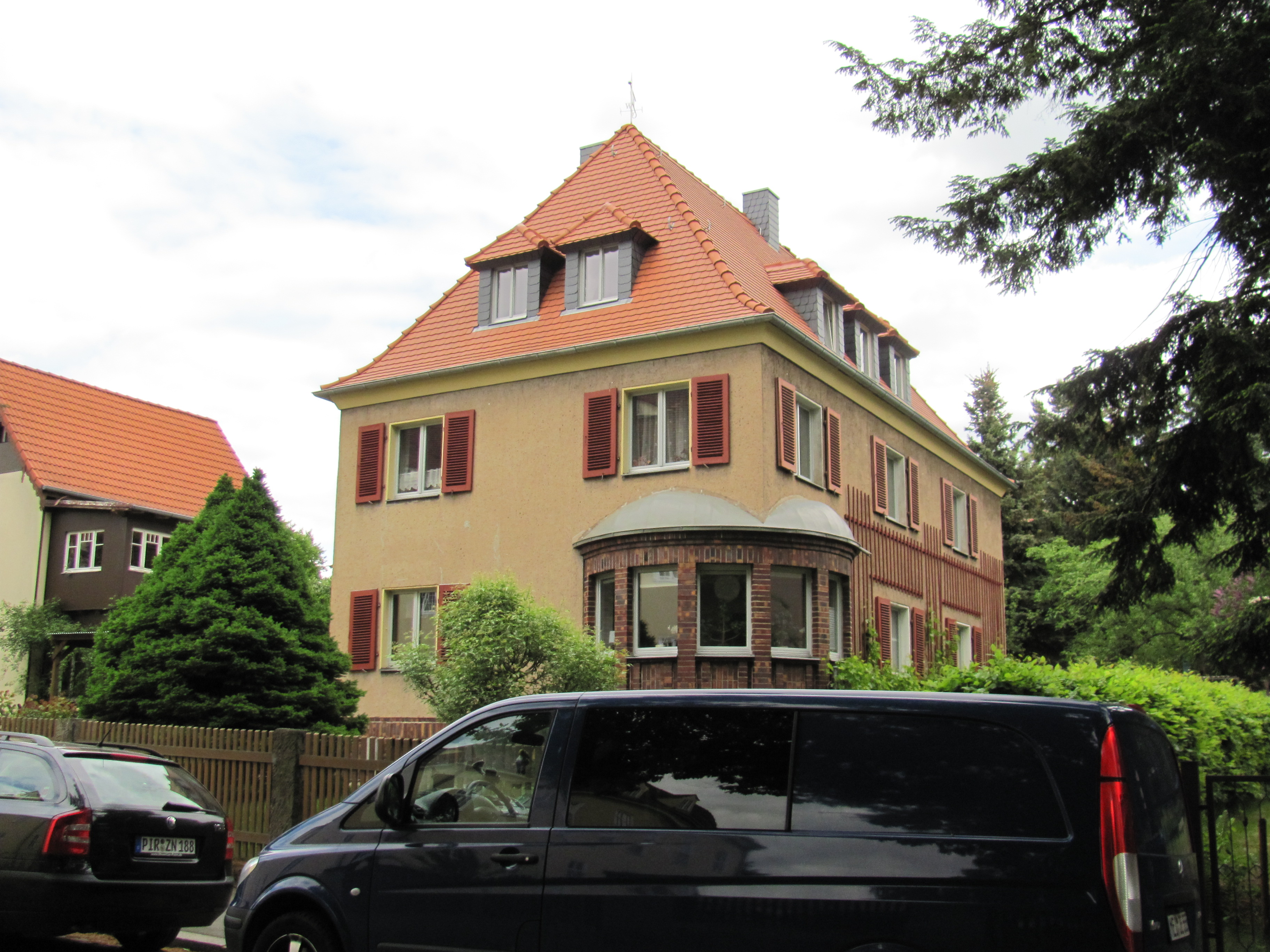 Niederlößnitz Kulturdenkmale